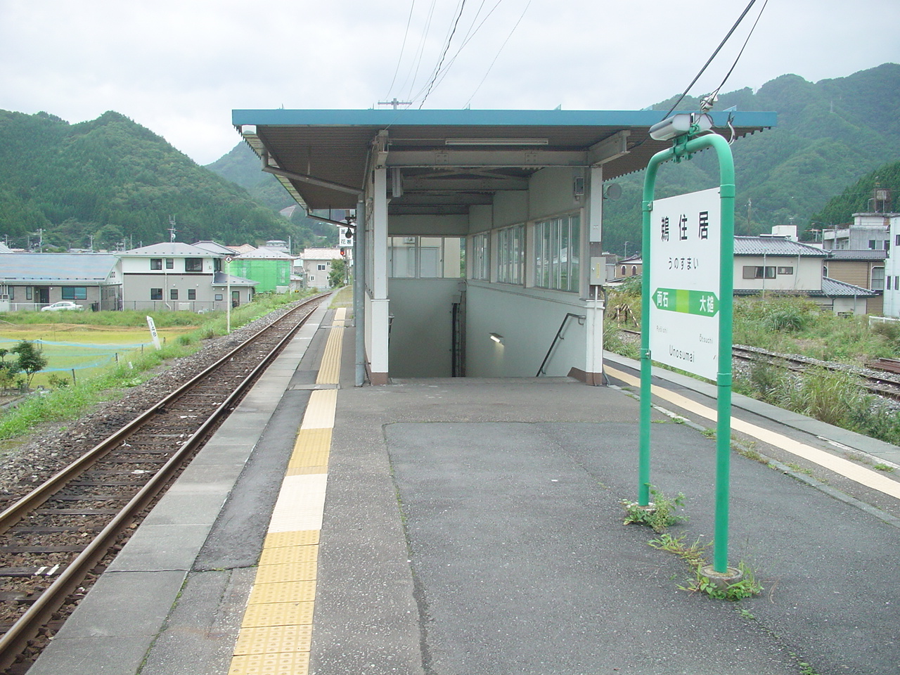 （鵜住居駅ホーム）